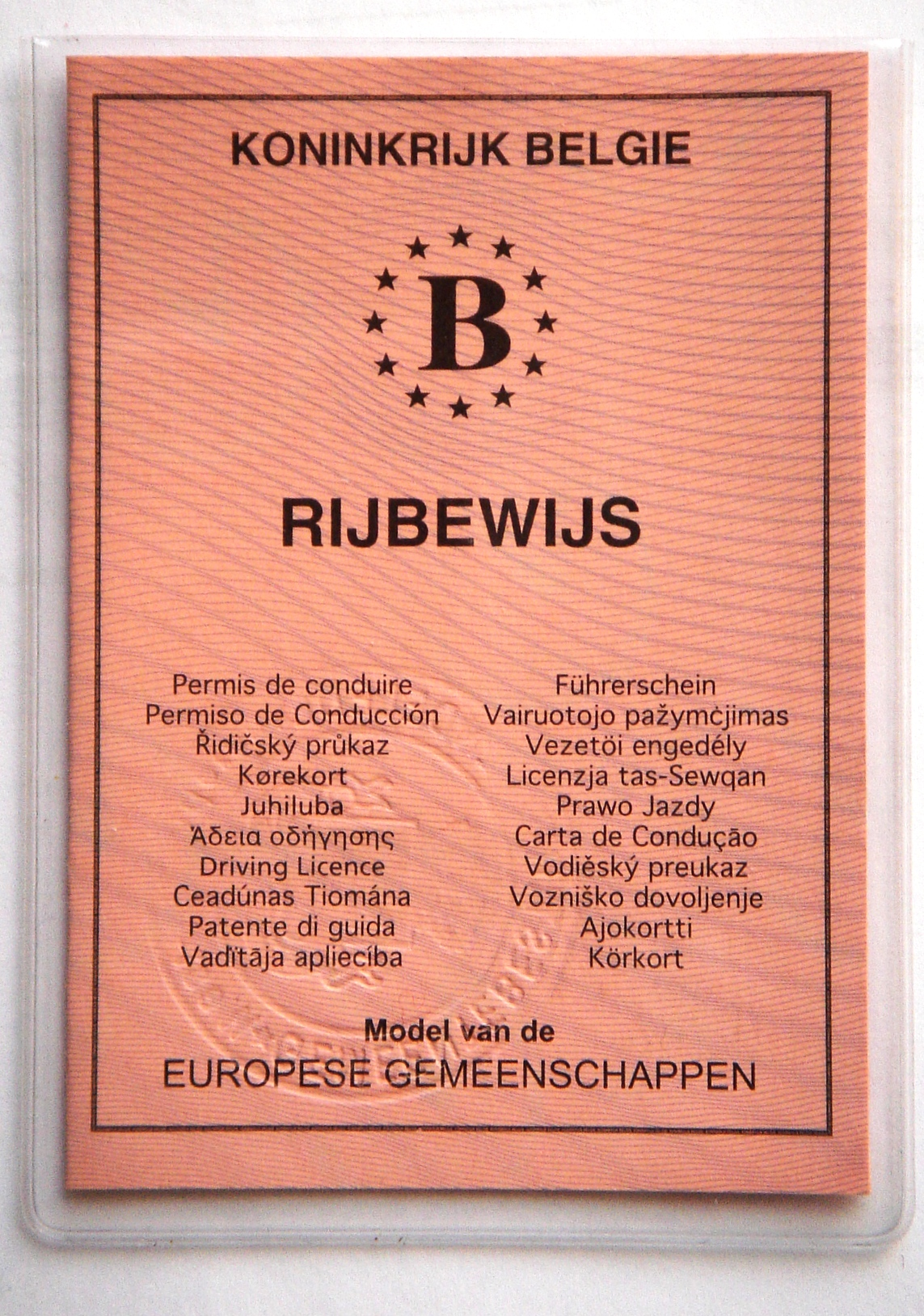 Scan van eigen rijbewijs (toch lekker anoniem)